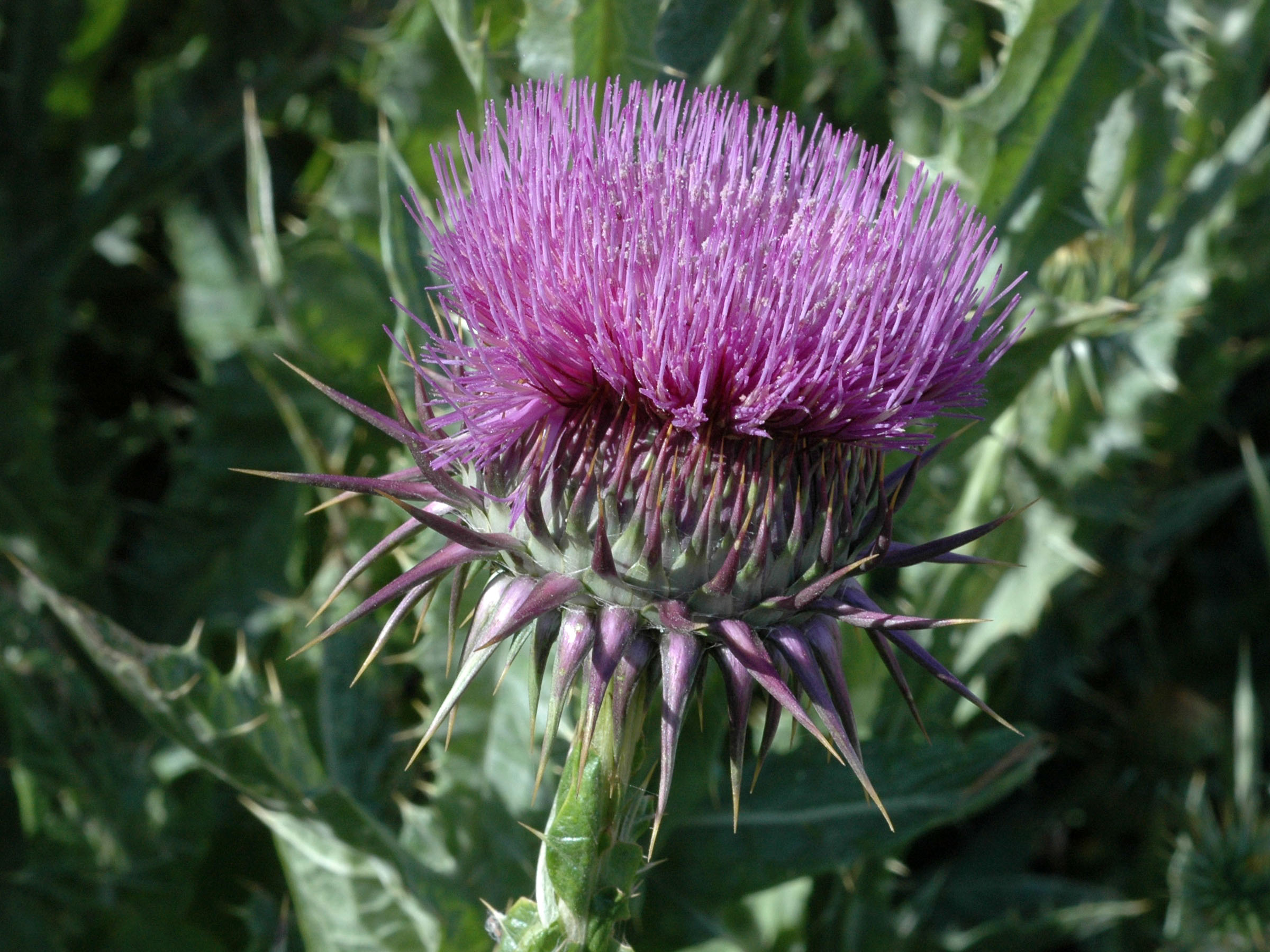 Onopordum nogalesii = Onopordum micropterum = Onopordum macracanthum - Capítulo en antesis.